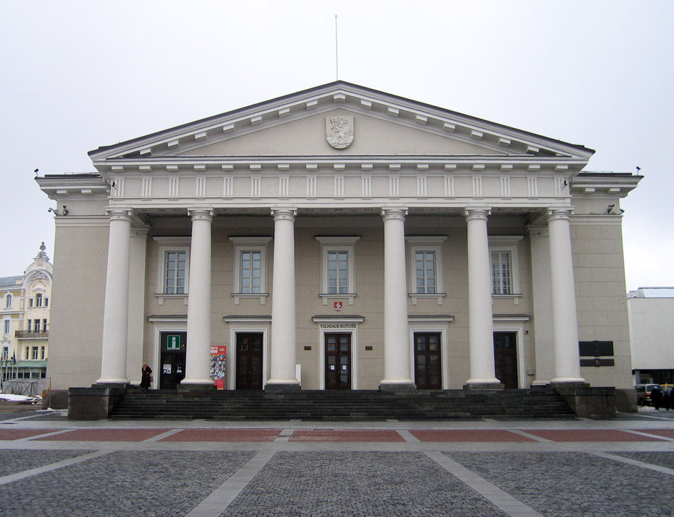 Vilnius City Hall (arch. Laurynas Stuoka-Gucevicius, 1799)